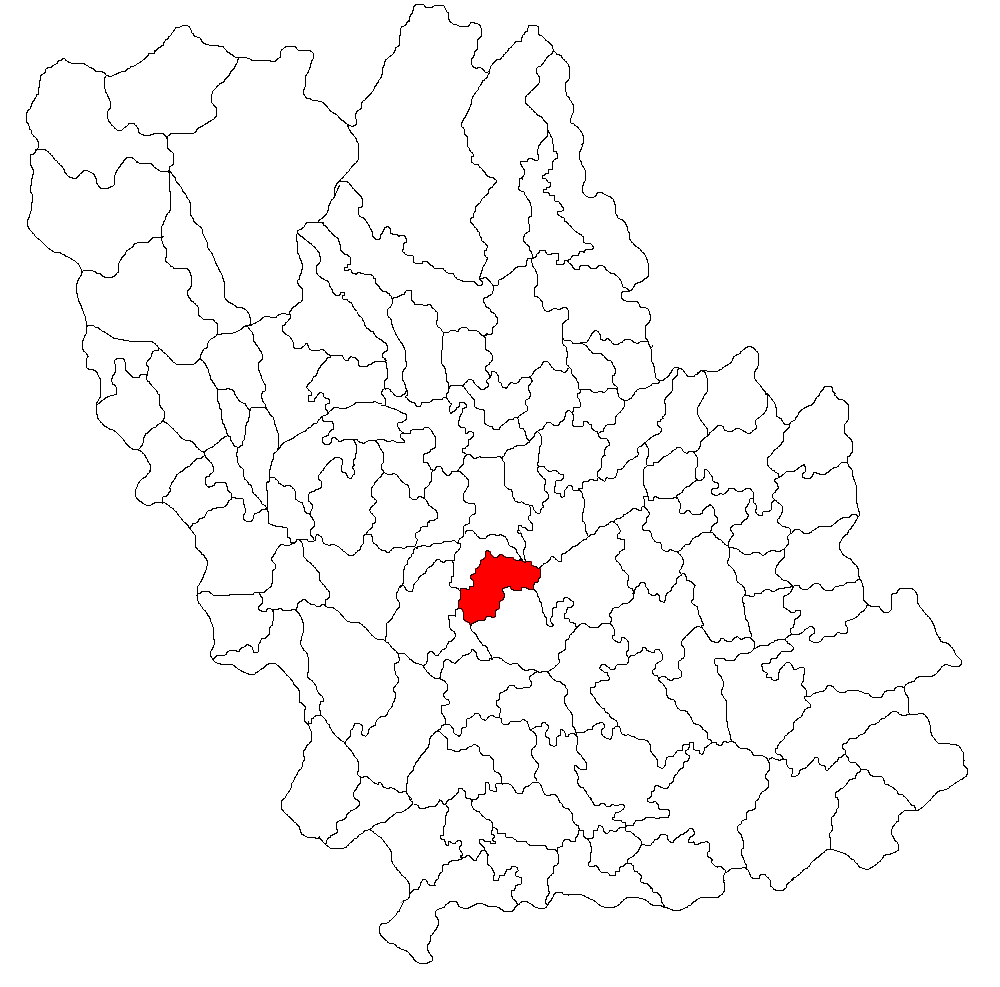 Categorie:Hărţi ale judeţului Prahova